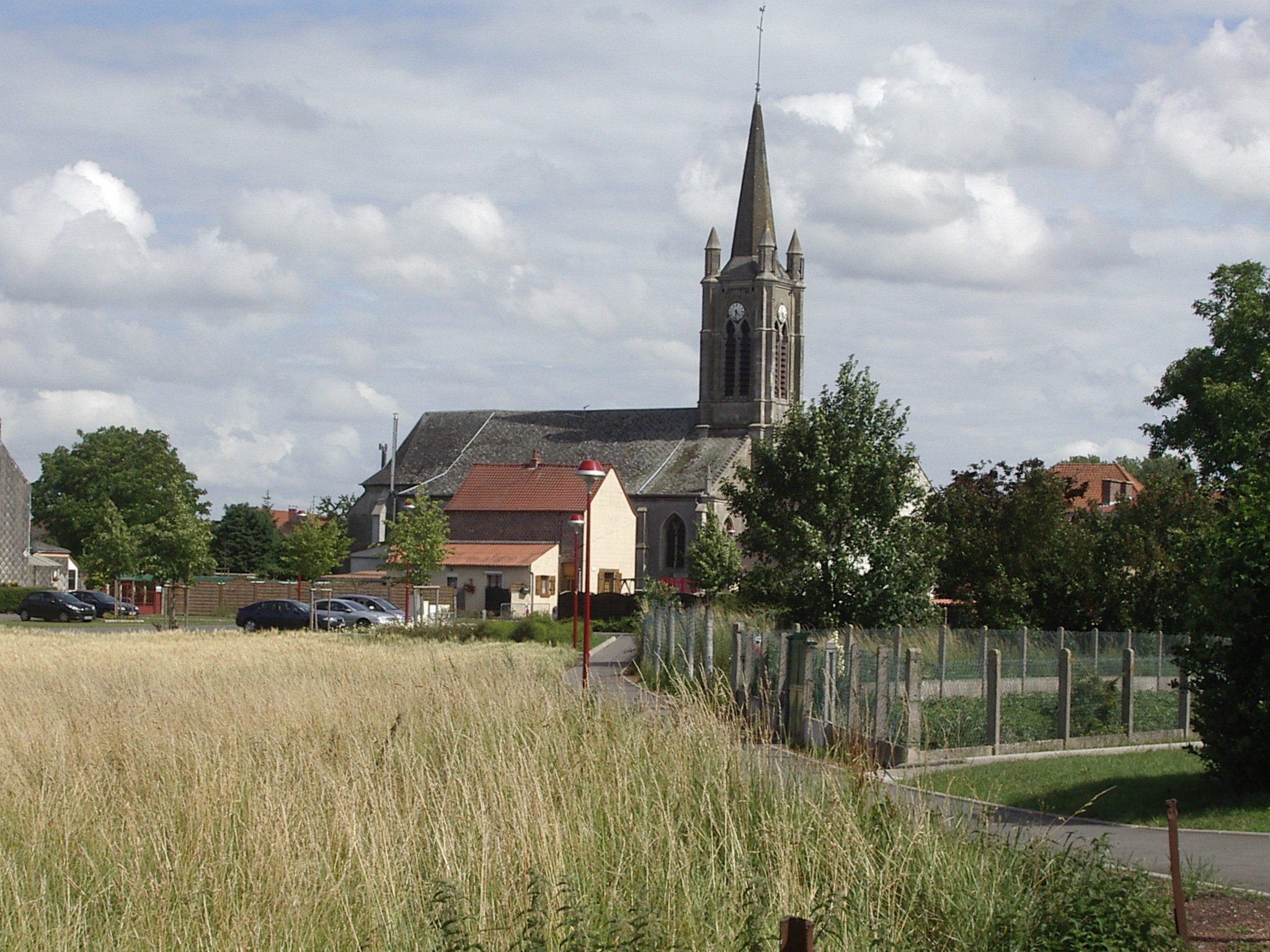 Eglise de Vicq (France, Nord)